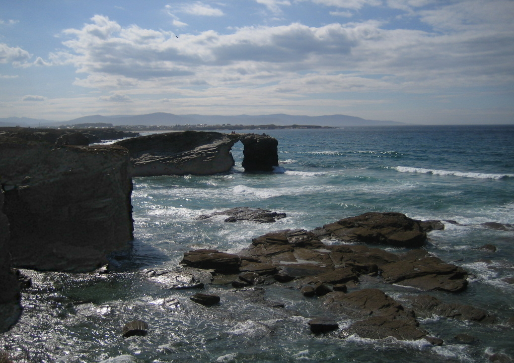 Las Catedrales